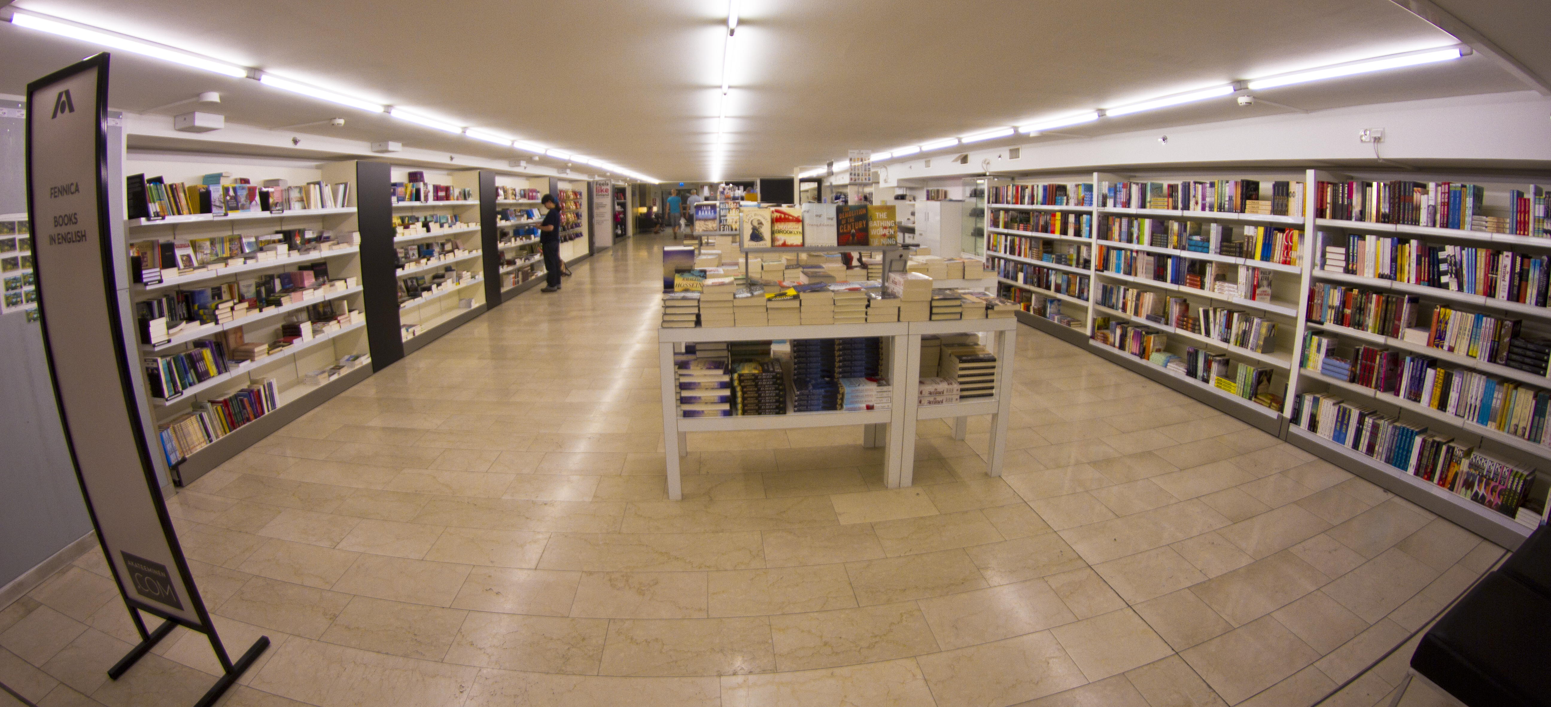 Alikulkutunneli Stockmannilta Akateemiseen kirjakauppaan.